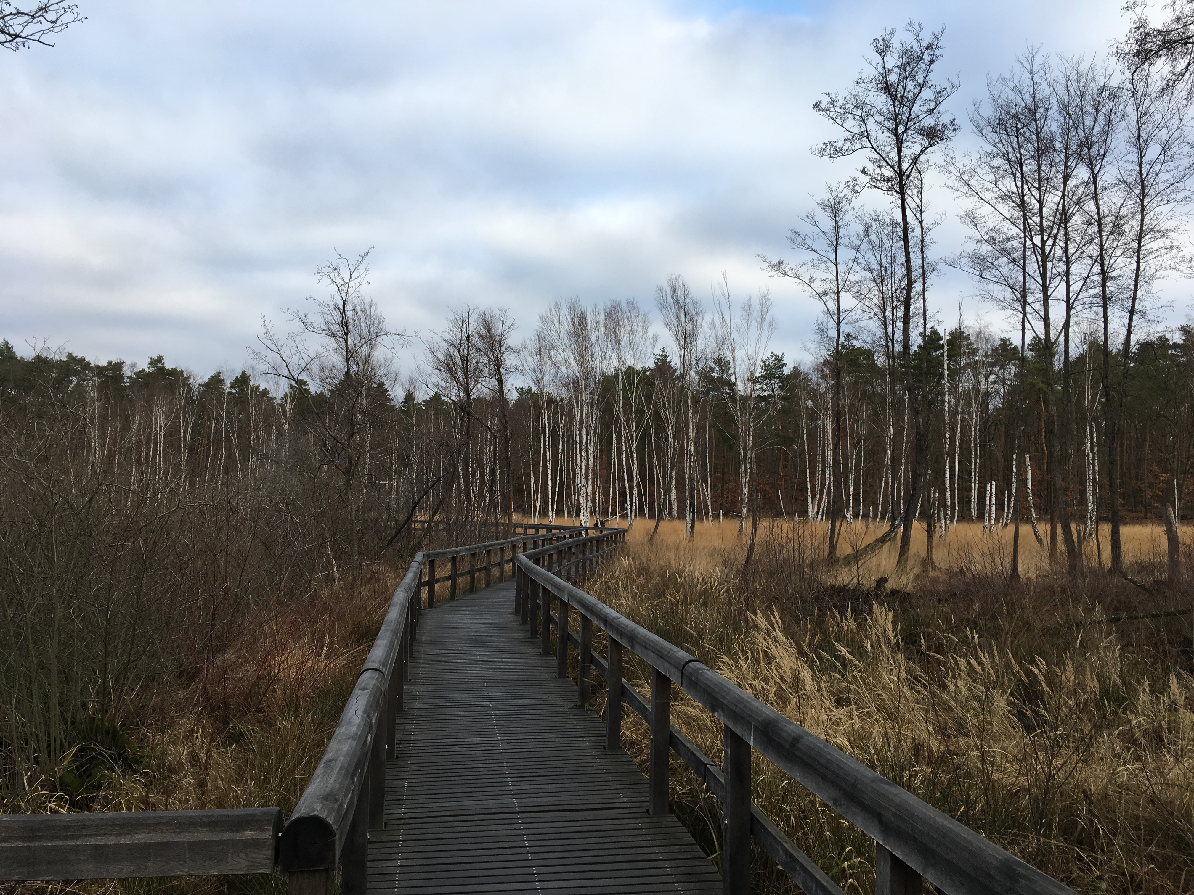 Das Teufelsseemoor Köpenick ist ein rund 6,45 Hektar großes Naturschutzgebiet in Berlin-Köpenick.